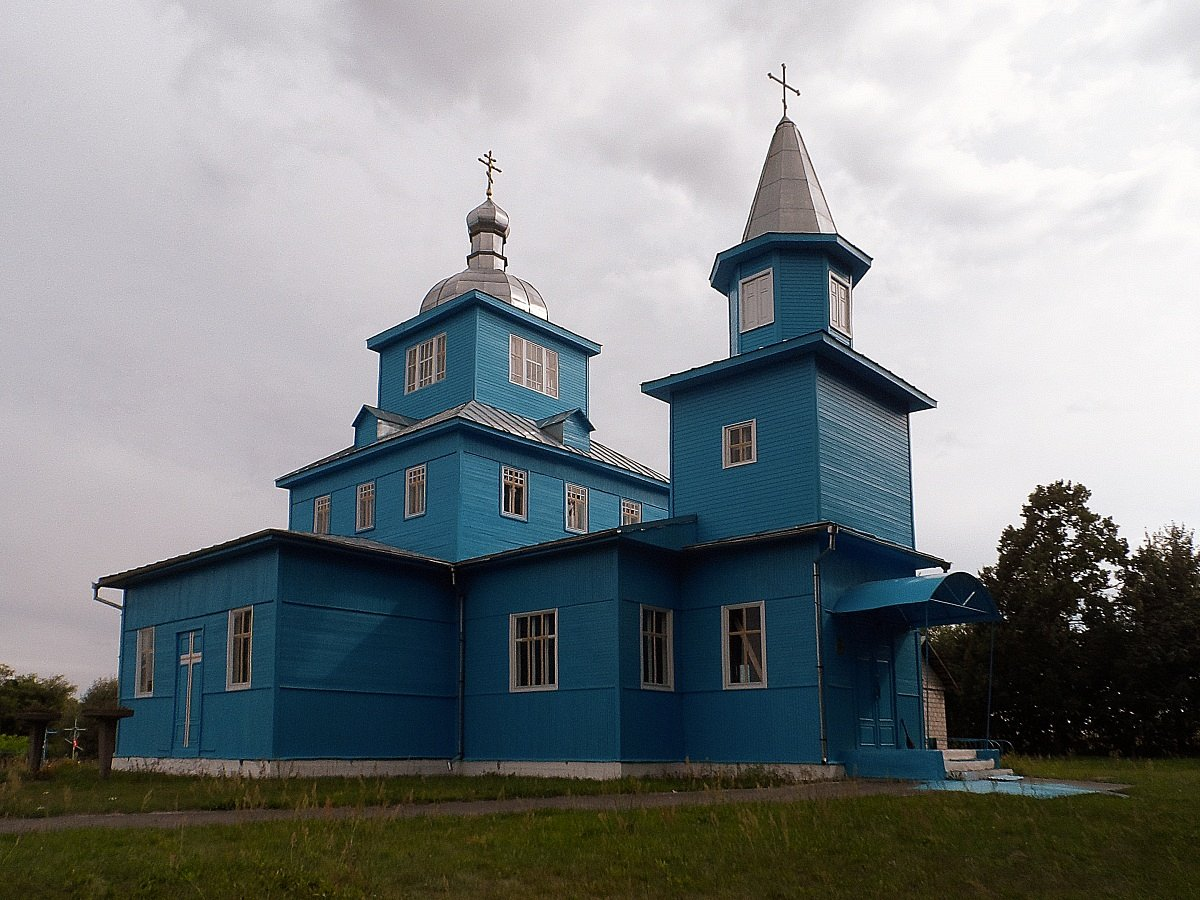 Парэчча. Царква